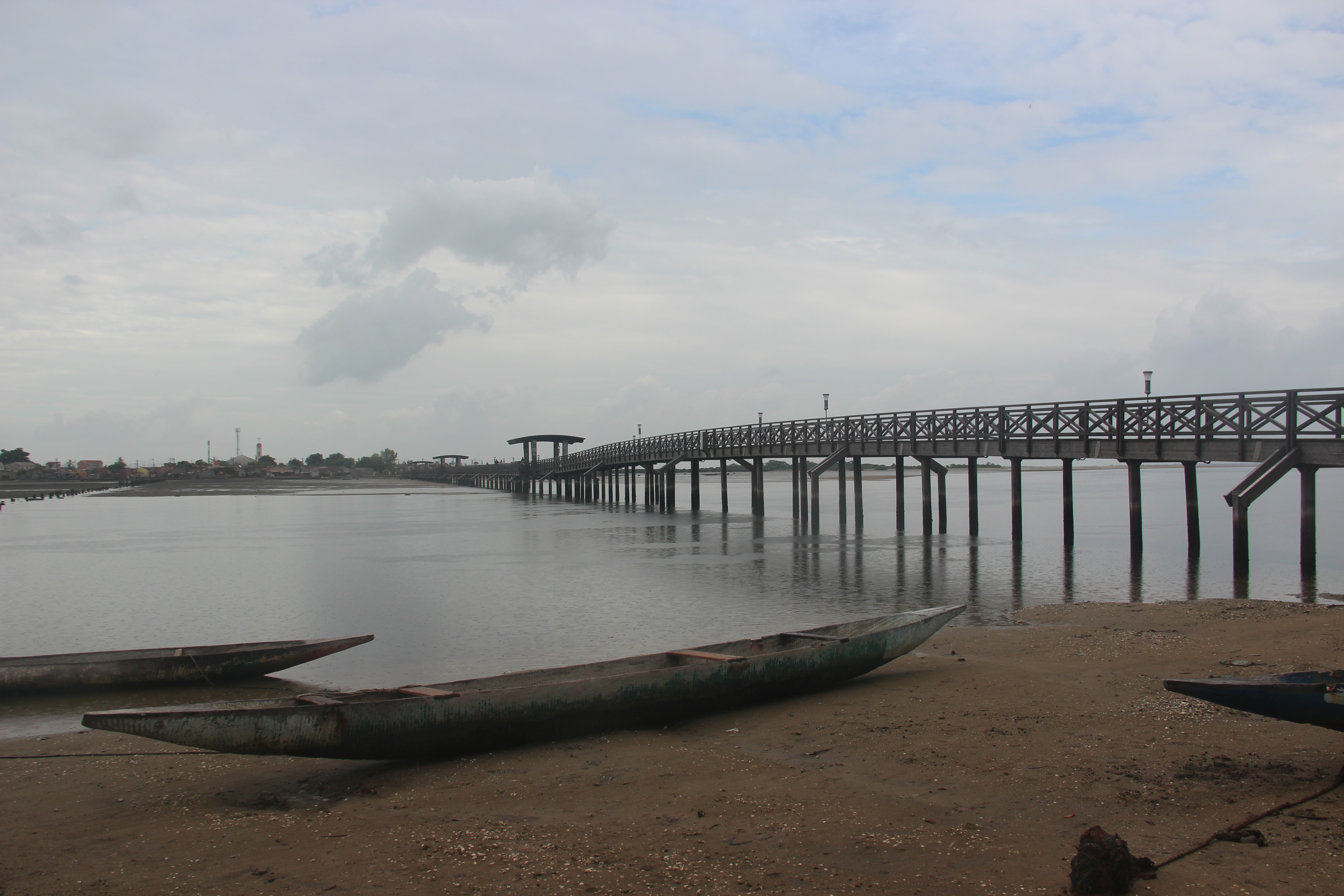 Pont de Joal-Fadiouth. This is an image with the theme "Africa on the Move or Transport" from: Senegal